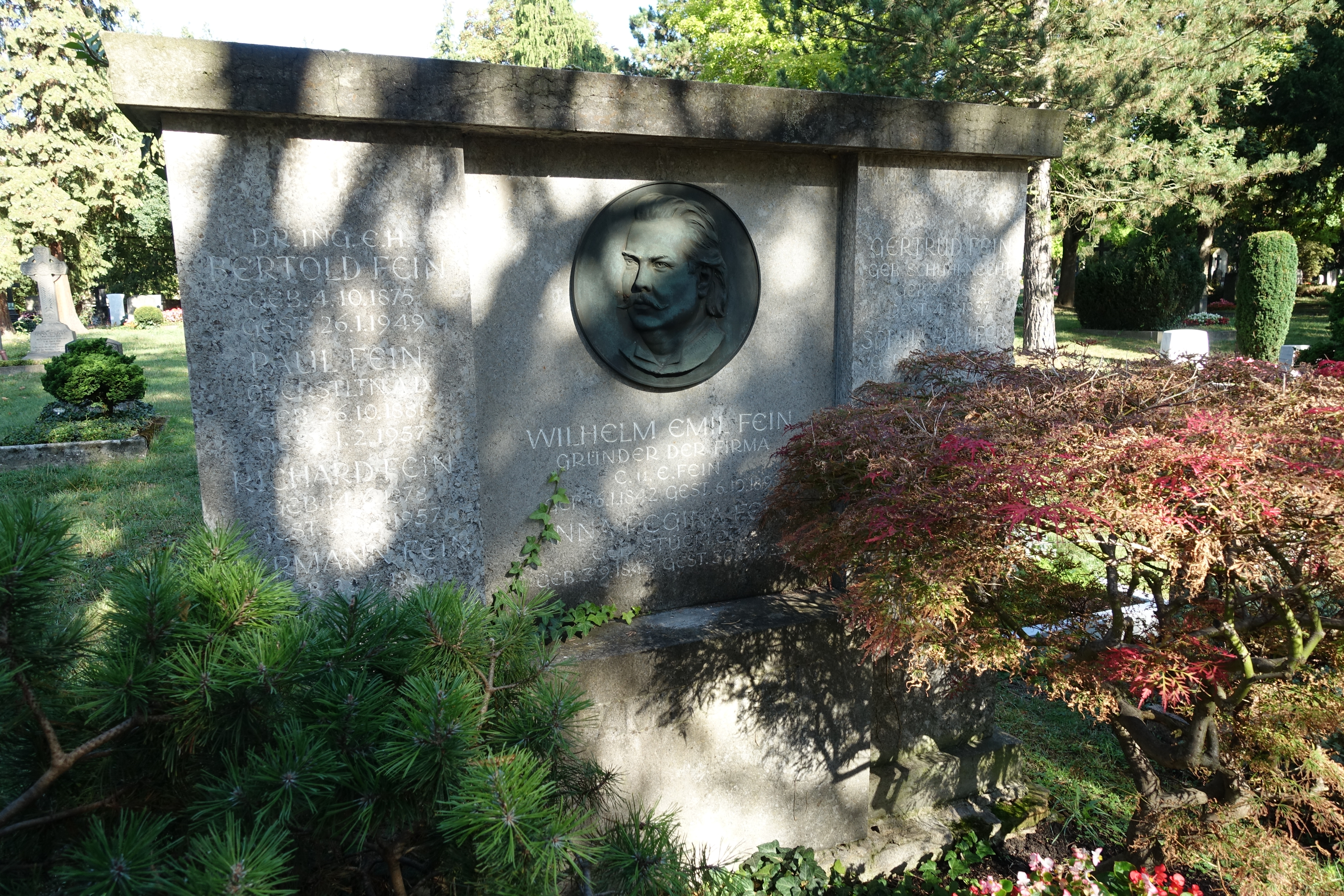 Grab von Wilhelm Emil Fein in Abteilung 13 auf dem Pragfriedhof in Stuttgart.